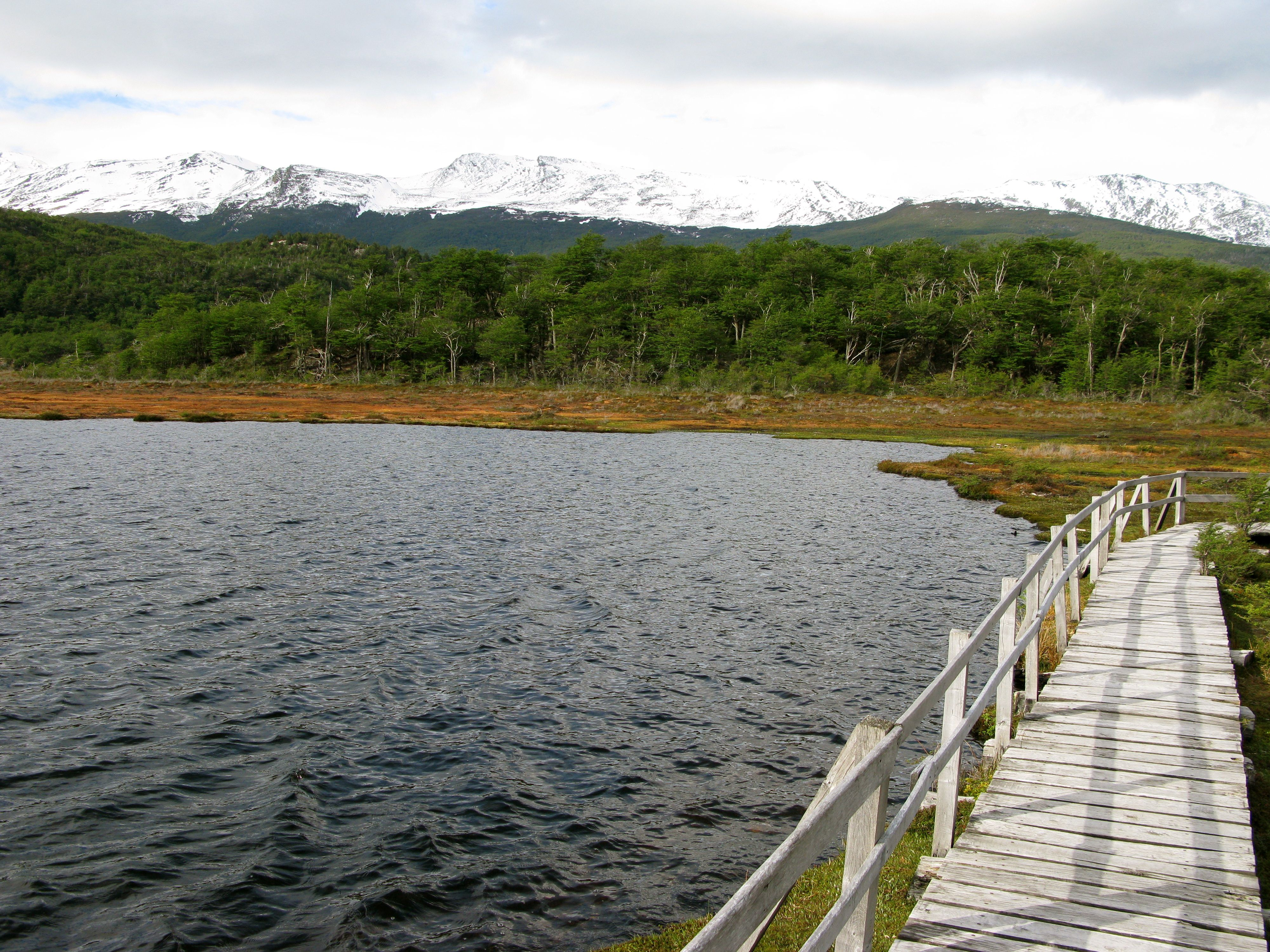 Lac Negra